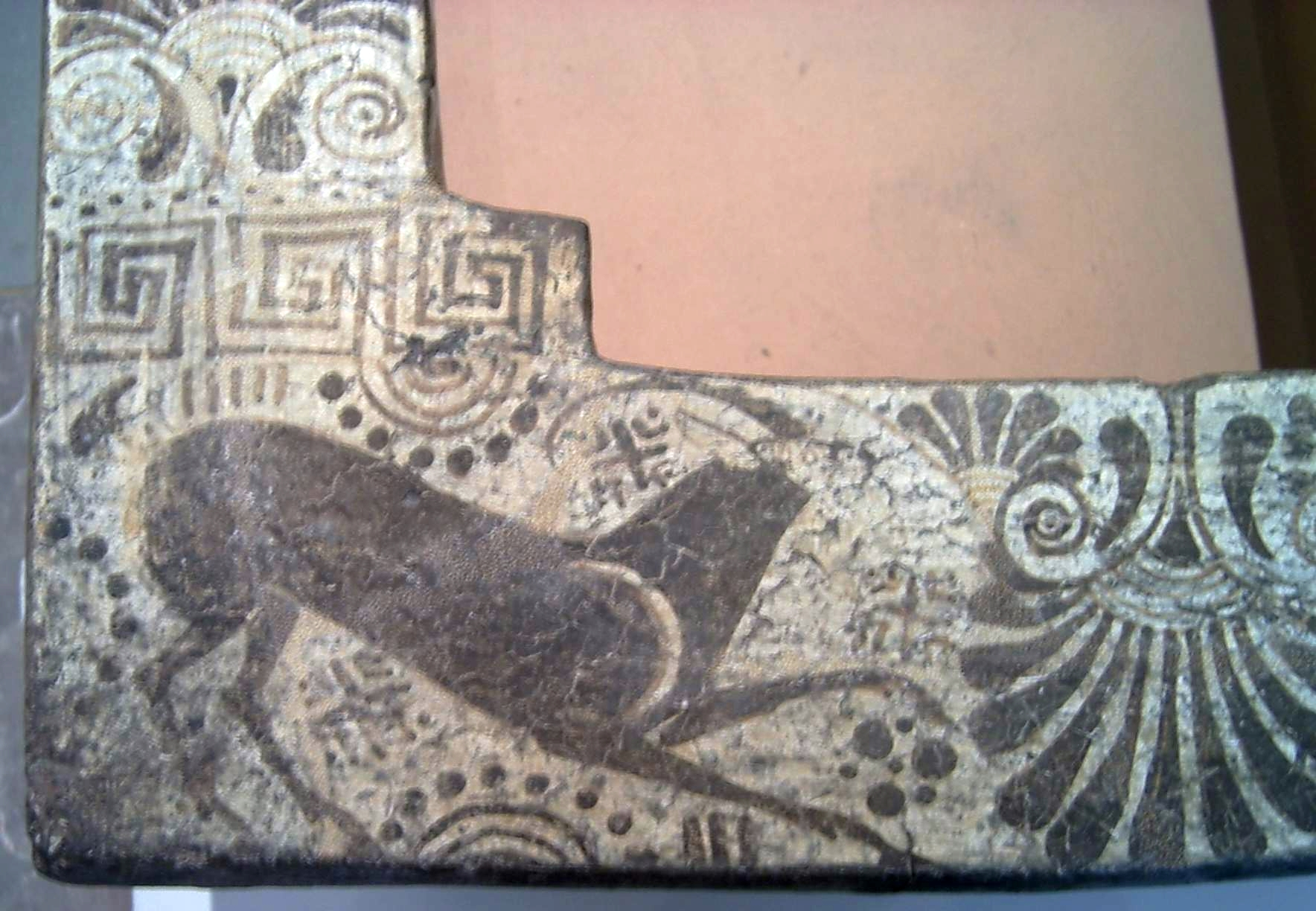 Klazomenischer Sarkophag aus Klazomenai mit homoerotischer Szene adeliger Jünglinge im Kopfteil; Länge 195 cm, Breite 74/62 cm, Tiefe 33,5 cm; bemalt im schwarzfigurigen Stil; Inv.-Nr.: 30030, Antikensammlung Berlin/Altes Museum